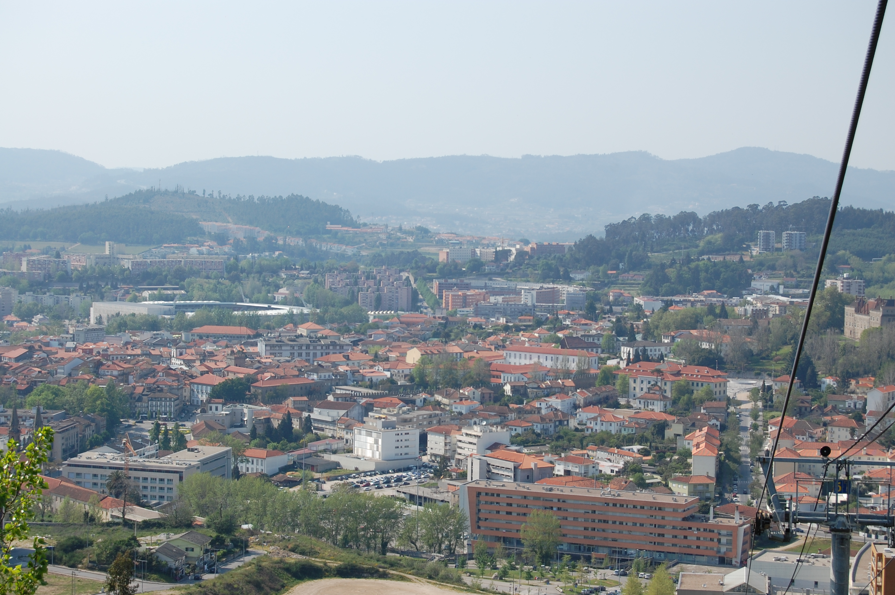 A cidade de Guimarães (distrito de Braga, noroeste de Portugal.